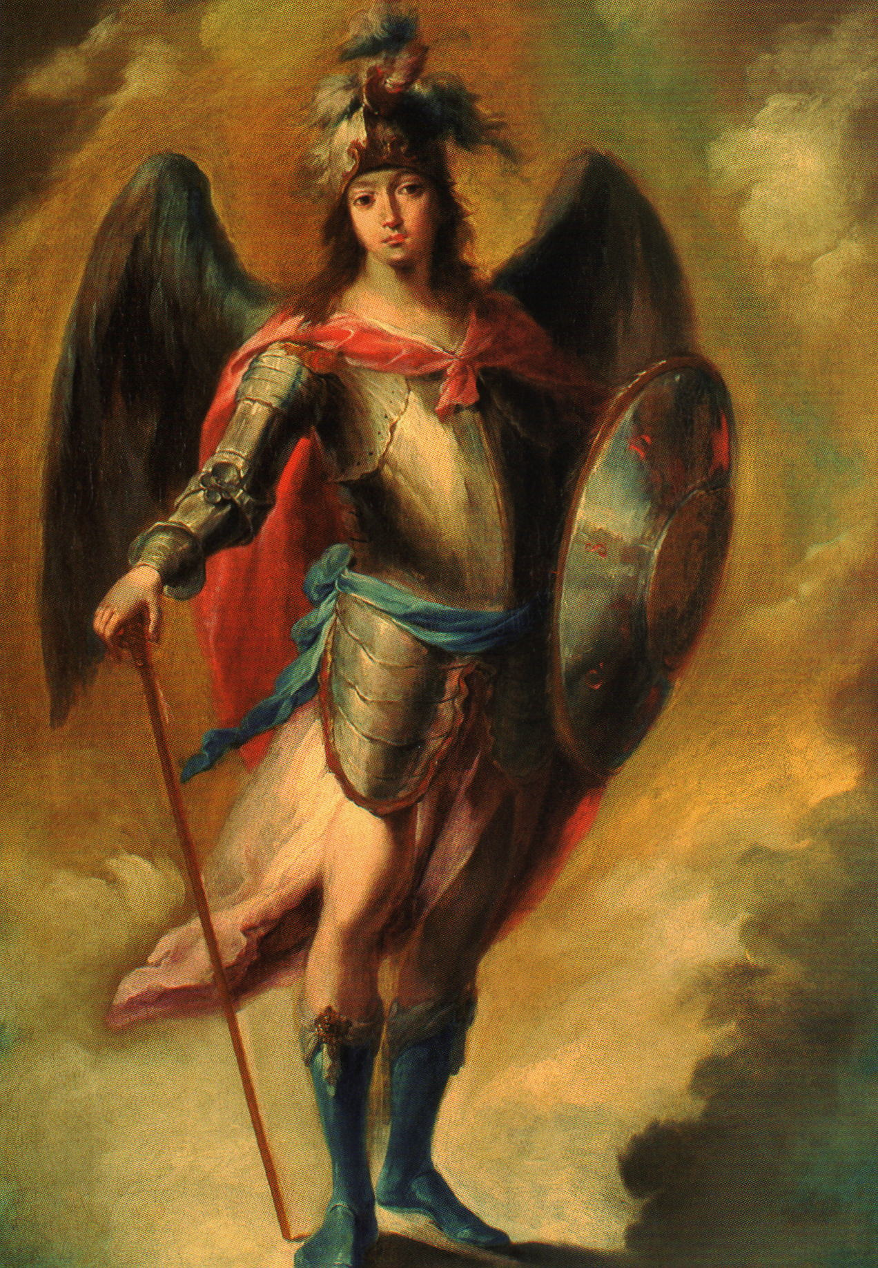 La obra representa al Arcángel San Miguel, y es una de las tres obras de Juan de Espinal que se conservan en el Museo de Bellas Artes de Sevilla.